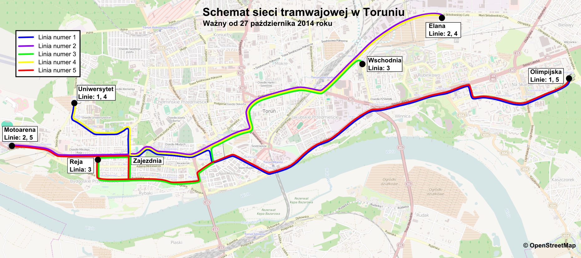 Siec tramwajowa w Toruniu